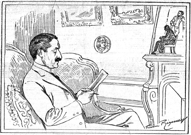 Drawing of Paul Deschanel in his apartment (Paris).